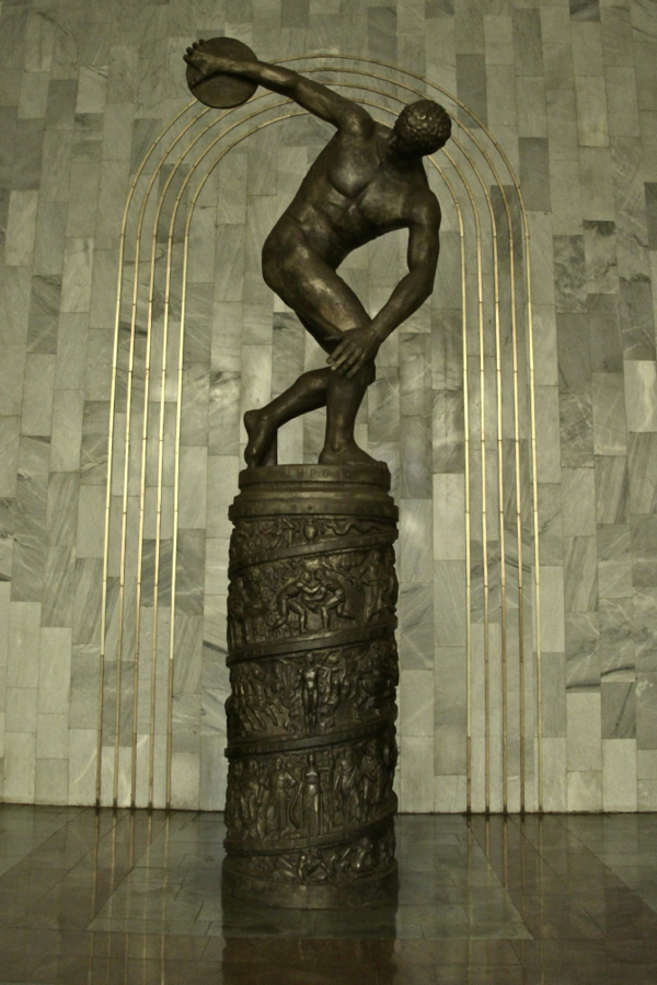 Yekaterinburg Metro (Екатеринбургский метрополитен)